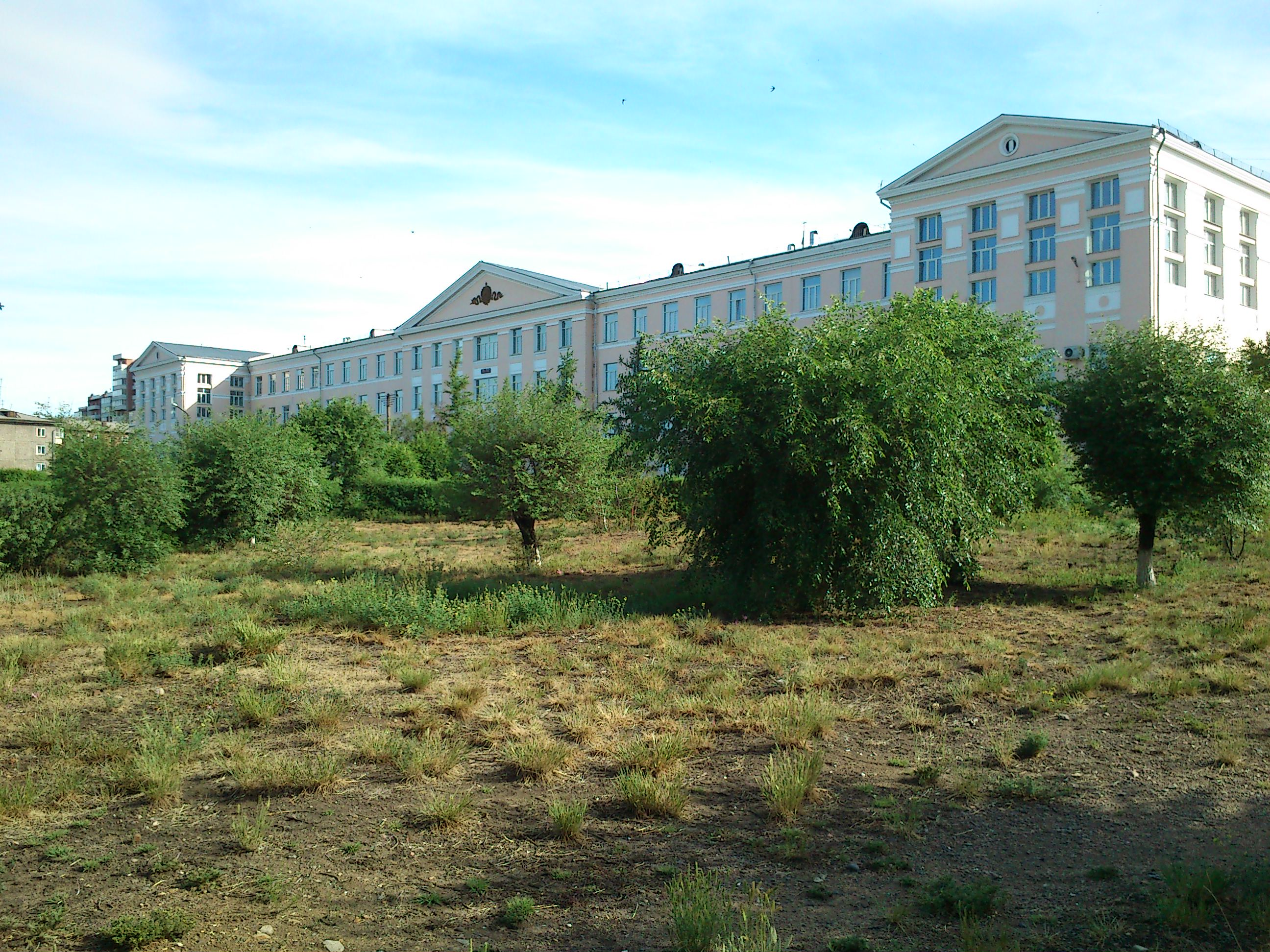 Бурятская государственная сельскохозяйственная академия